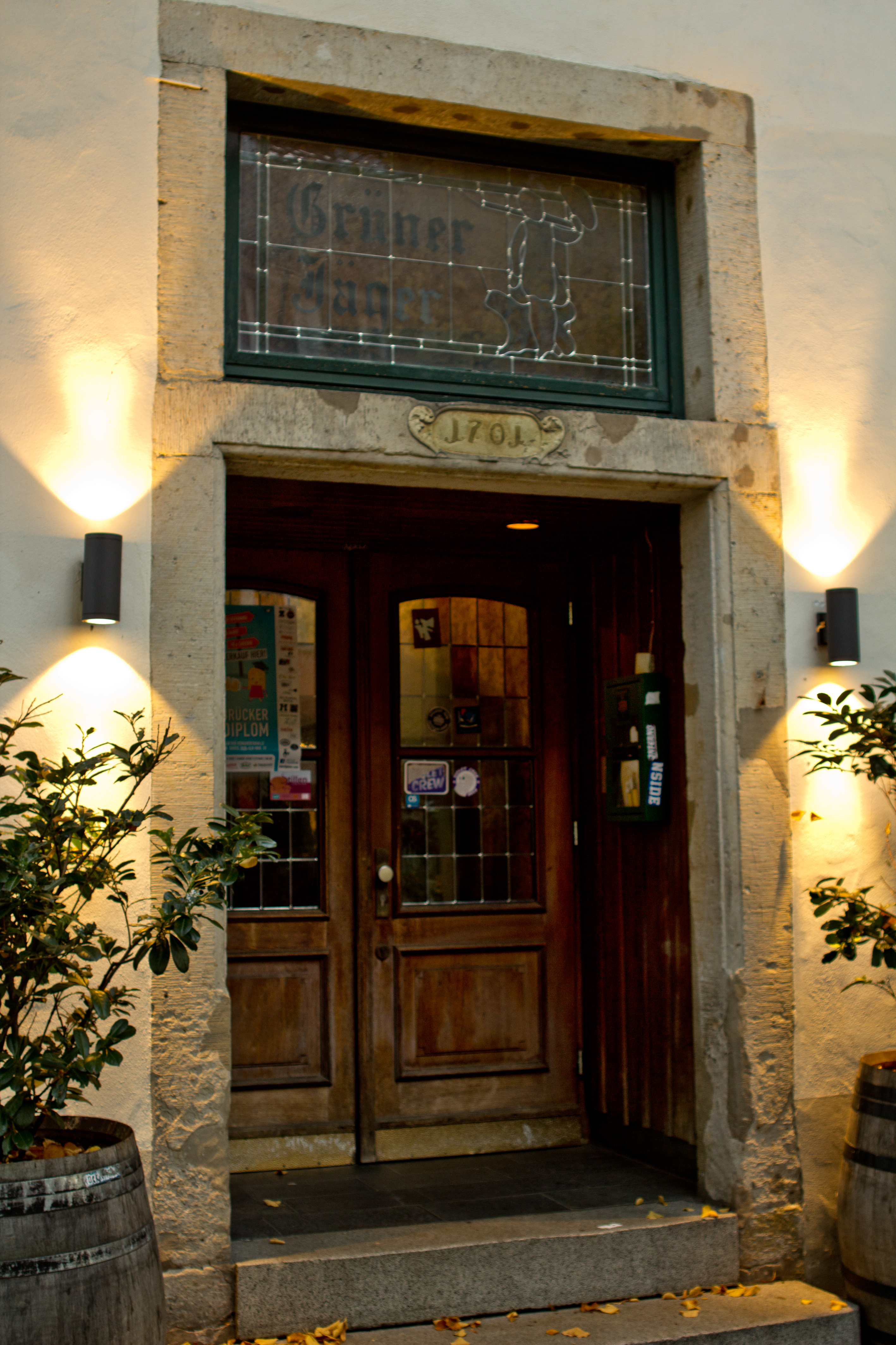 Zu sehen ist der Haupteingang